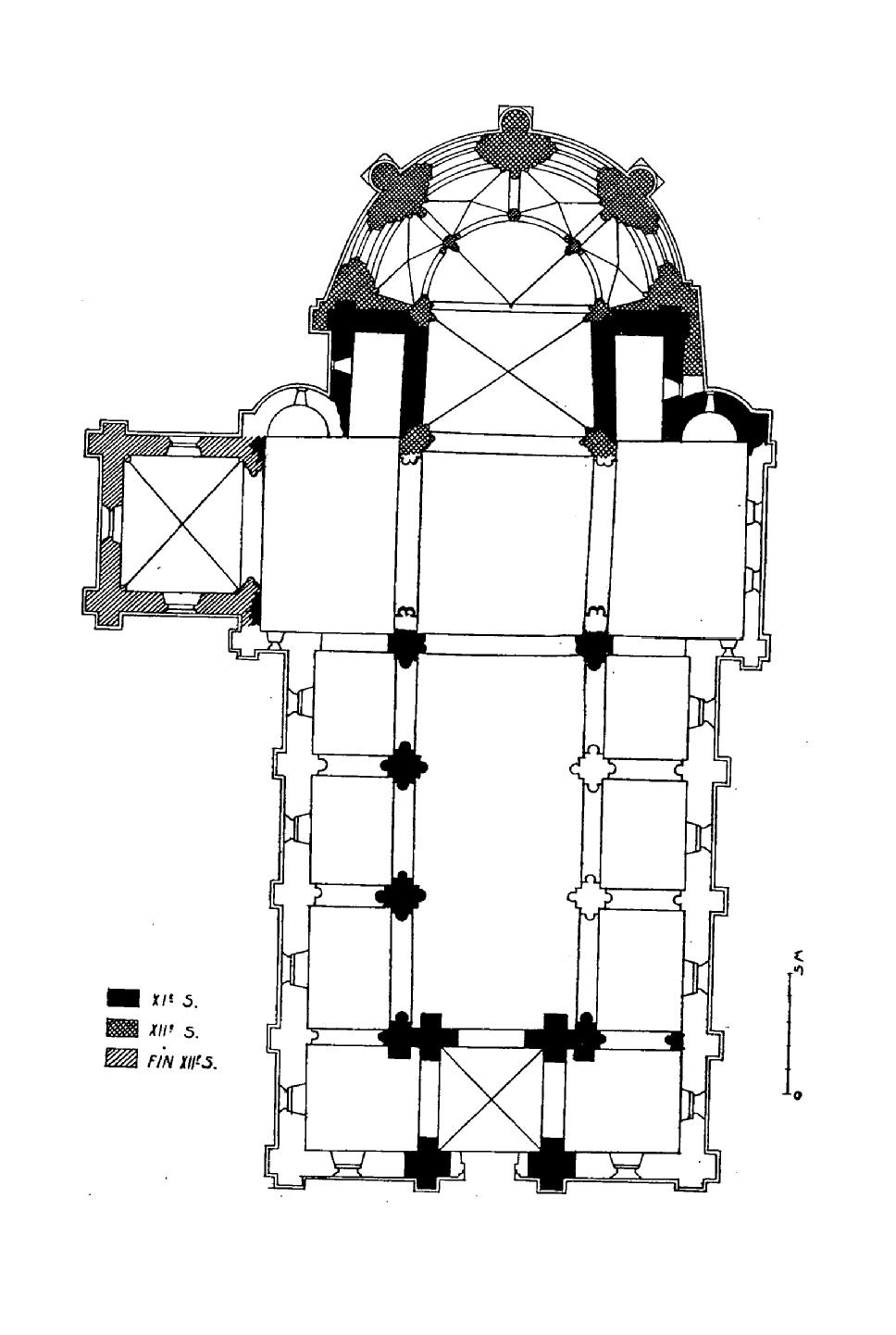 Plan au milieu du XIIe siècle. Les murs et piliers marqués en blanc n'existent plus. Le plan actuel est toutefois en grande partie conforme à l'état du milieu du XIIe siècle, si l'on ne tient pas compte du voûtement d'ogives de la nef et de la croisée, et du voûtement d'arêtes du bas-côté nord. Sinon, les seules différences concernent le portail du bas-côté nord qui ne date que de 1608 et le remaniement du bas-côté sud au XVIIe siècle, qui n'a pas été revoqué par les restaurations.